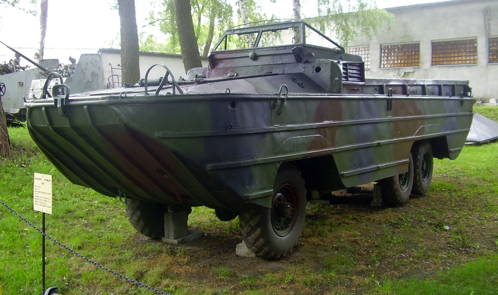 Samochód pływający BAW